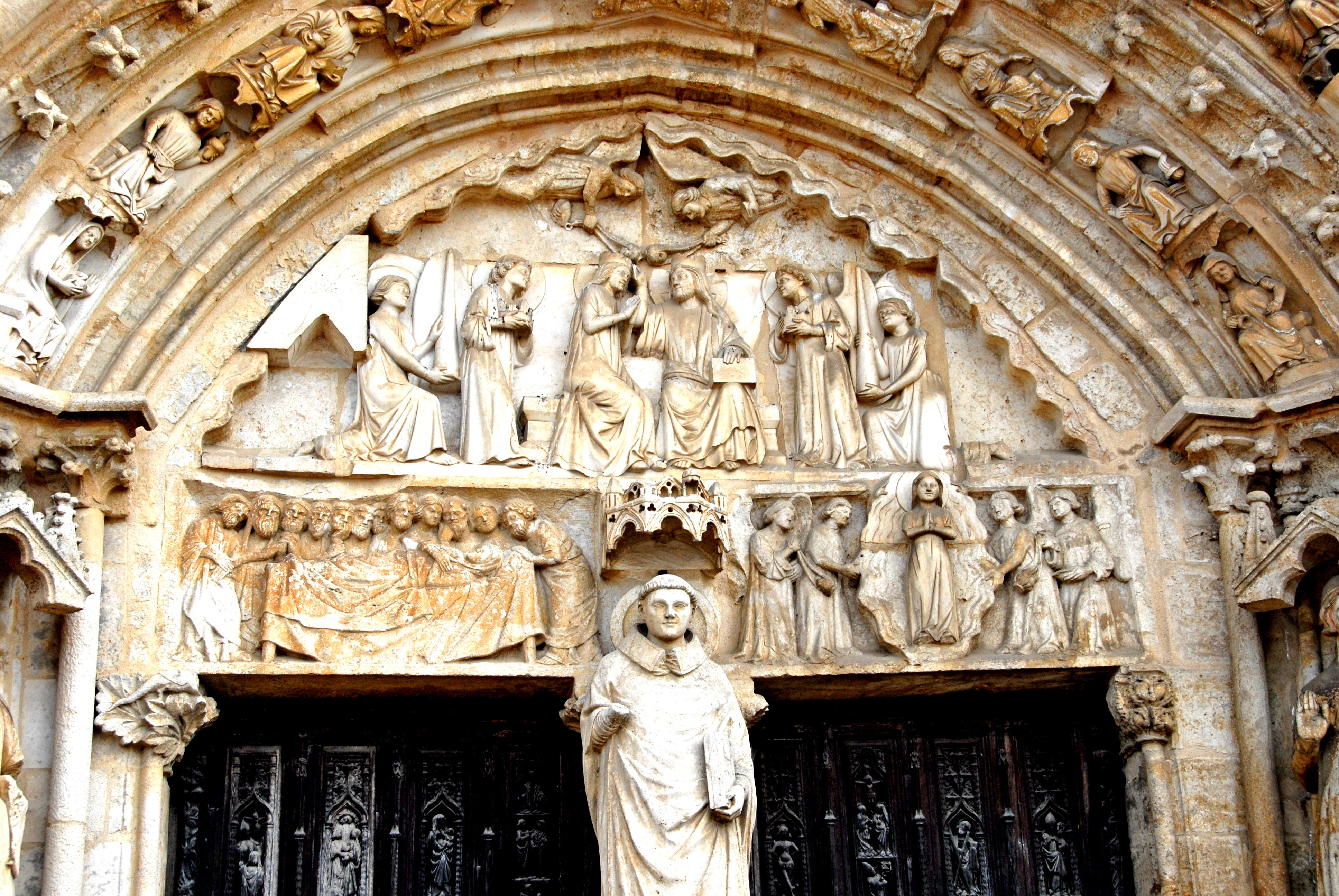 St-Thibault de Saint-Thibault, Nordportal, Tympanon